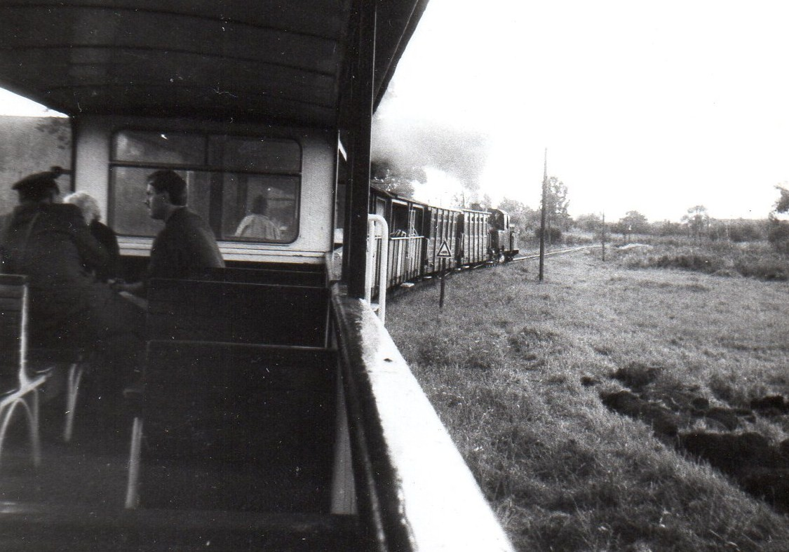 Zabytkowa lokomotywa parowa Px38-805 z okolicznościowym pociągiem pasażerskim na szlaku Żnińskiej Kolei Powiatowej.